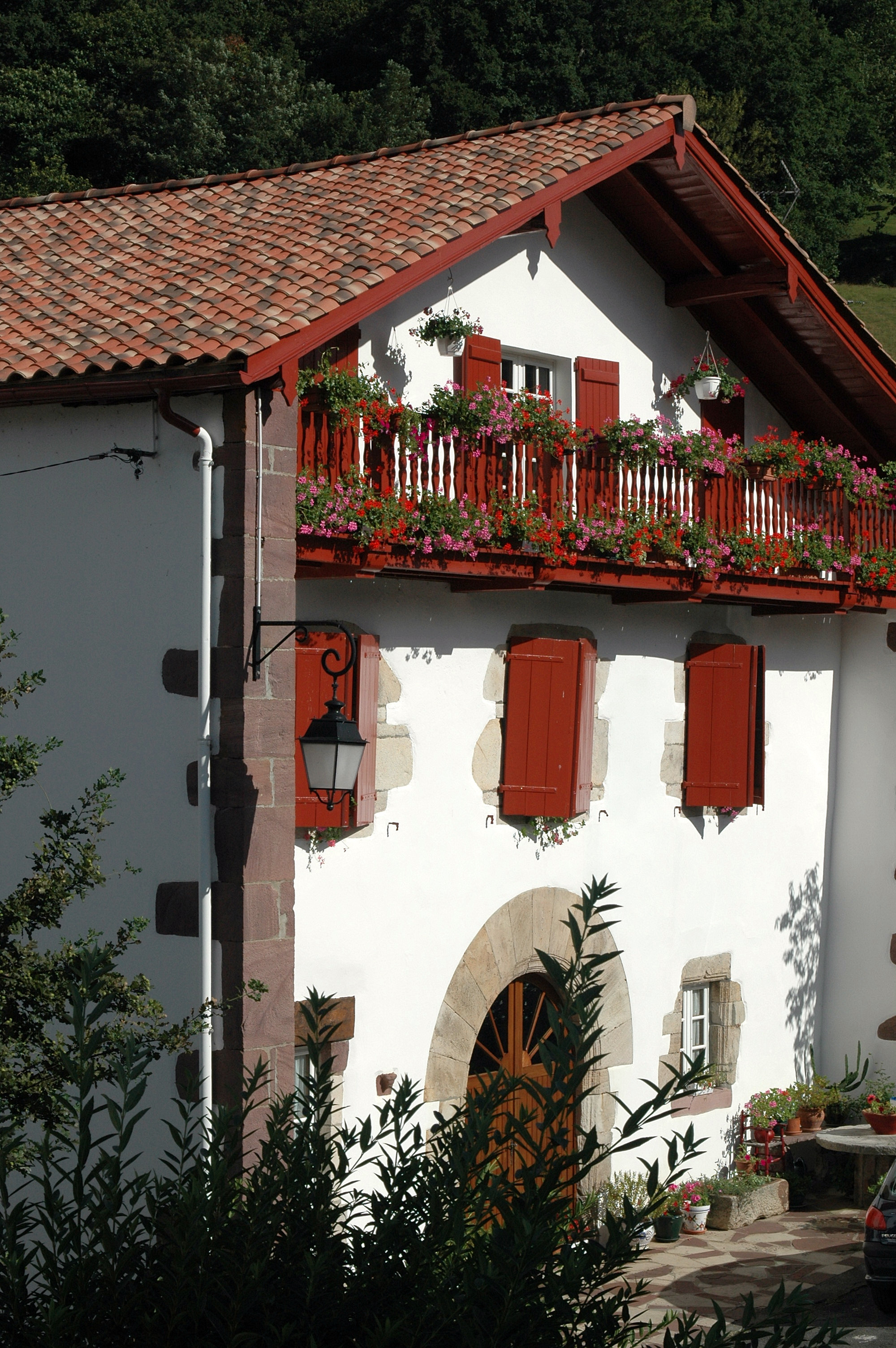 Saint-Étienne-de-Baïgorry, maison basque. Photo prise le 03/08/06 par Harrieta171